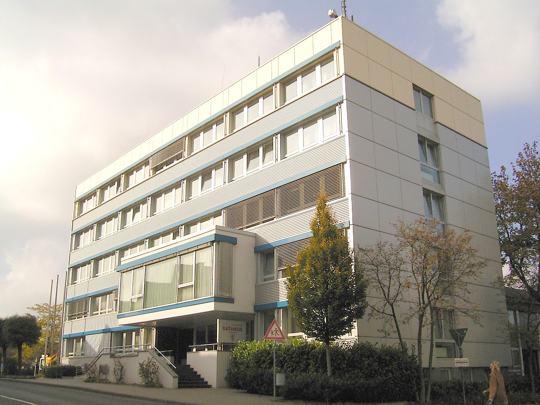 Radevormwald